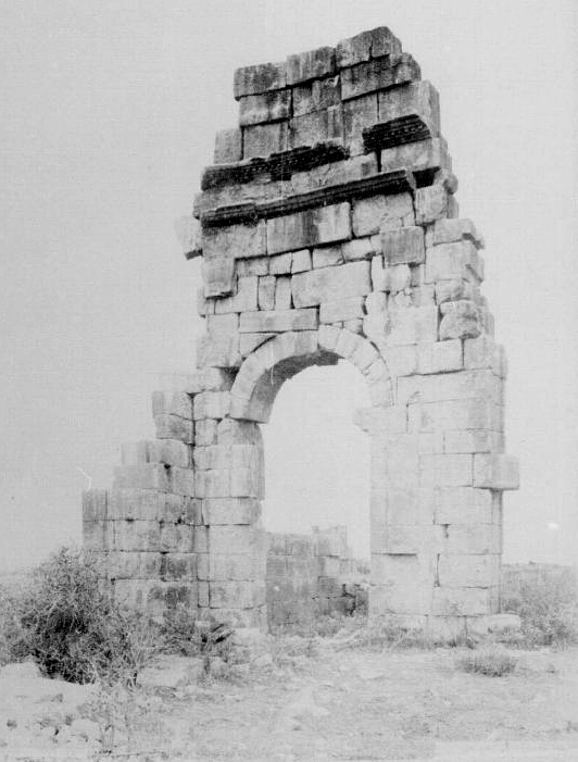 1=Les ruines de la basilique de Volubilis, prises en photographie par Henri Poisson de La Martinière en 1887.